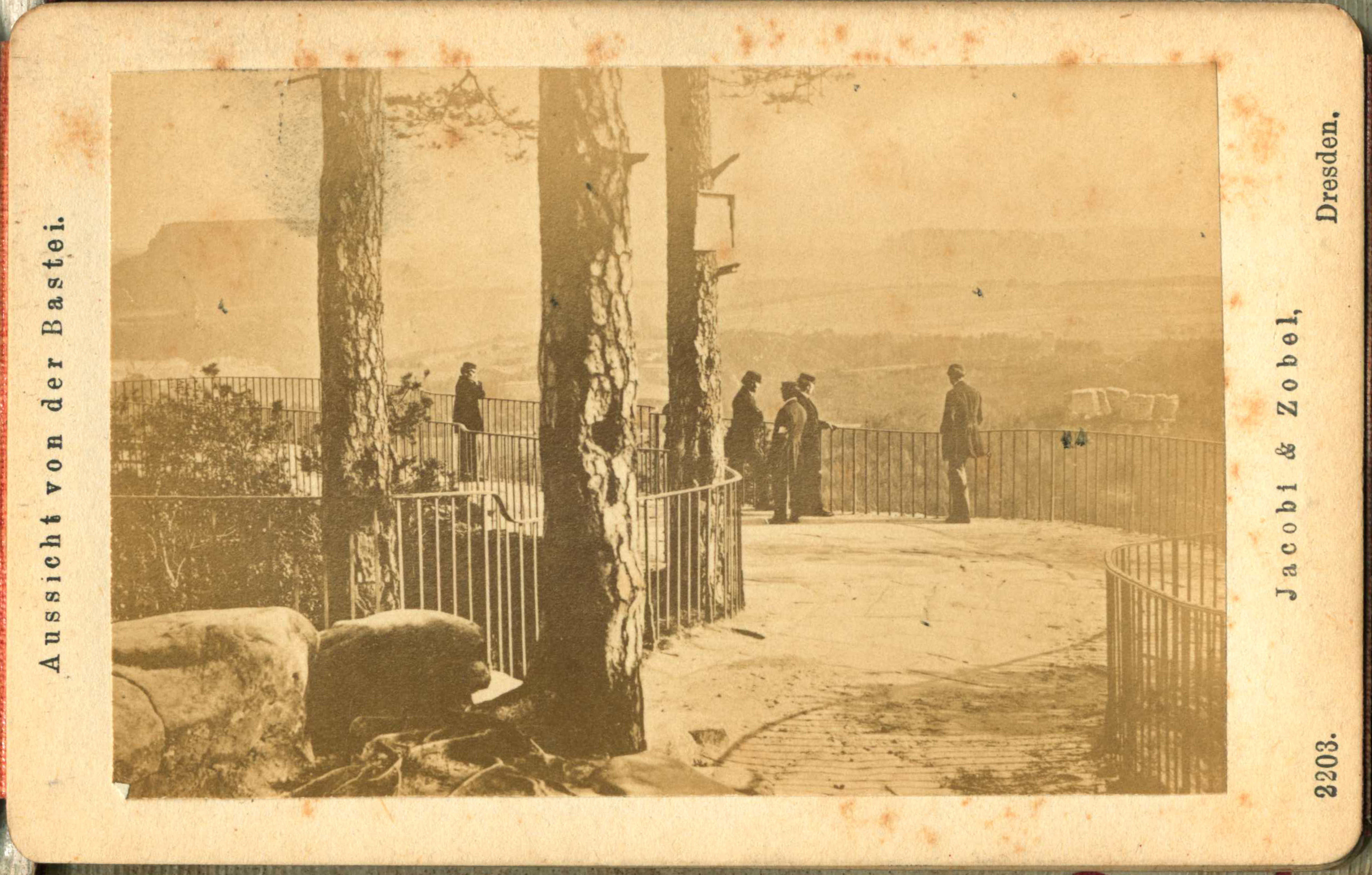 Aussicht von der BasteiLeporello: Bild 1, Bild 2, Bild 3, Bild 4, Bild 5, Bild 6, Bild 7, Bild 8, Bild 9, Bild 10, Bild 11, Bild 12